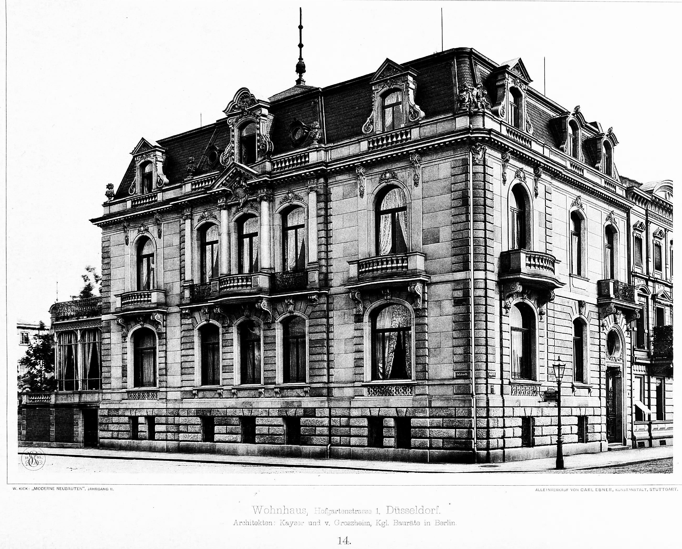 Wohnhaus Hofgartenstraße 1 in Düsseldorf, erbaut von den Berliner Architekten Heinrich Kayser und Karl von Großheim für den Industriellen Franz Haniel